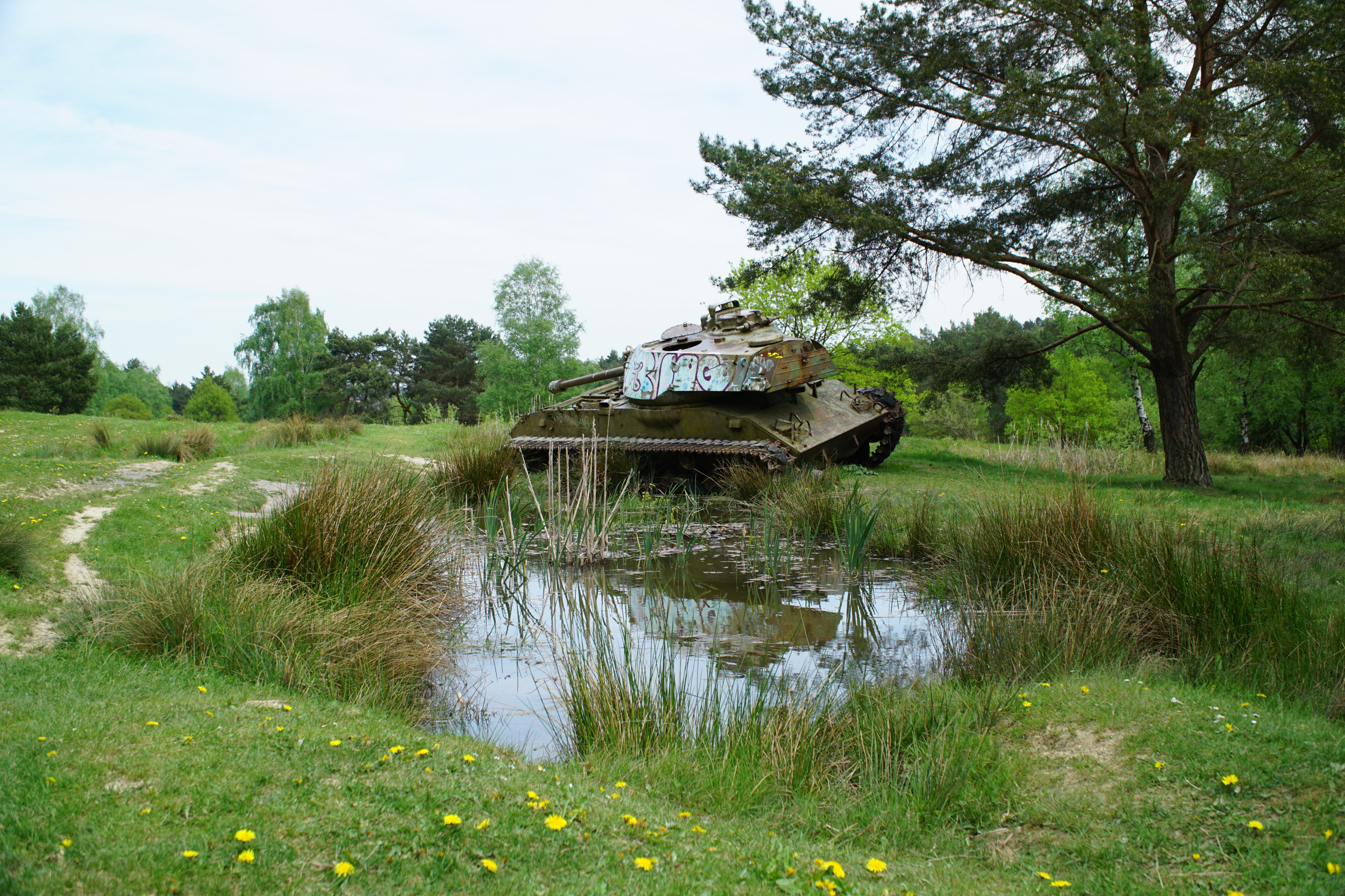 Ausgedienter Panzer im Naturschutzgebiet „Brander Wald“ (NSG ACS-012) in Aachen. Das Naturschutzgebiet ist auch Standortübungsplatz. Die Fahrspuren bilden „Kleinstgewässer“, in denen wohl seltene und bedrohte Tierarten ihren Lebensraum finden.